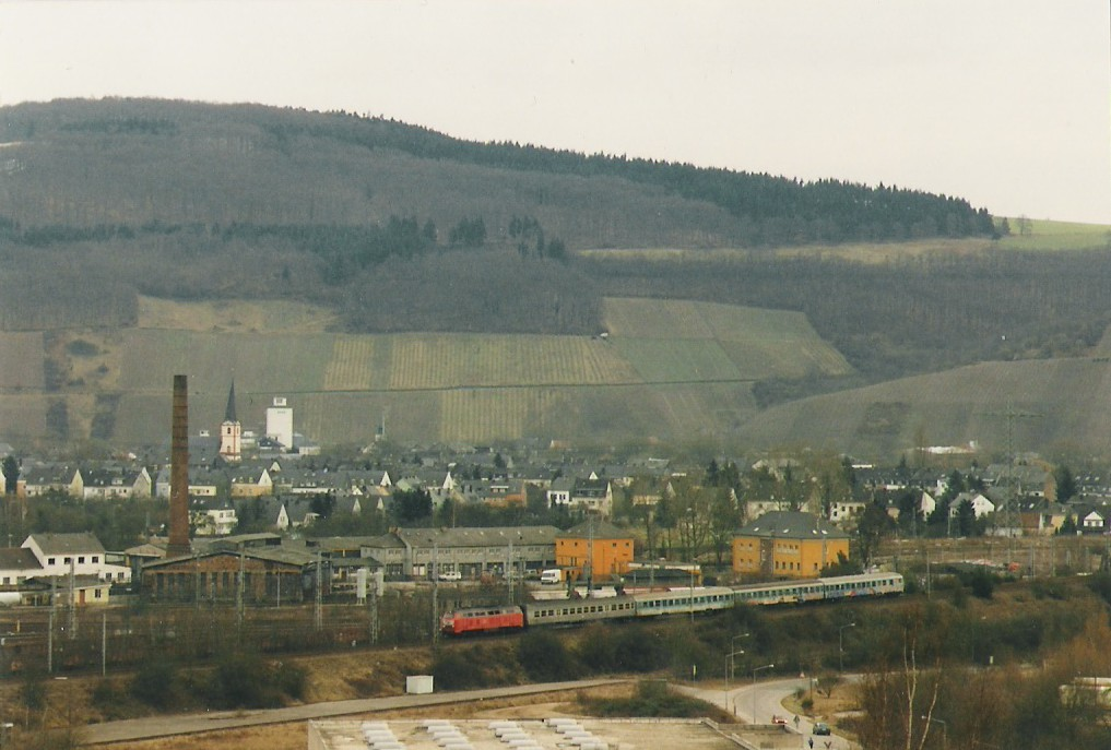 Aufnahme des ehemaligen Bahnbetriebwerkes Ehrang in Trier 1996. Im Vordergrund fährt ein Regionalexpress Trier-Köln, der mit einer Lokomotive der Baureihe 215 bespannt ist.